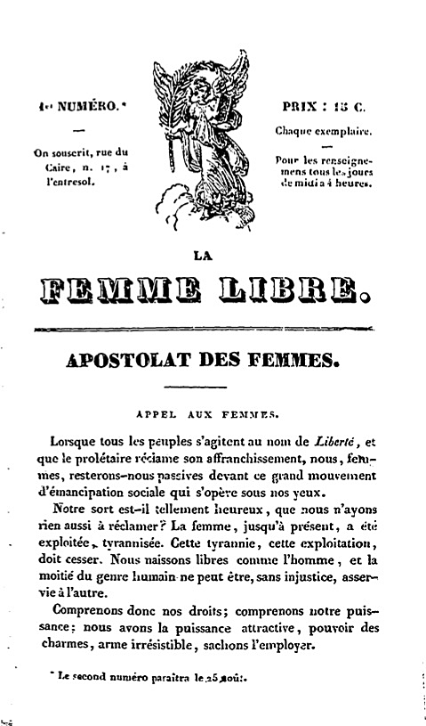 Couverture du n° 1 du premier journal réalisé et écrit par des femmes pour des femmes au XIXe siècle